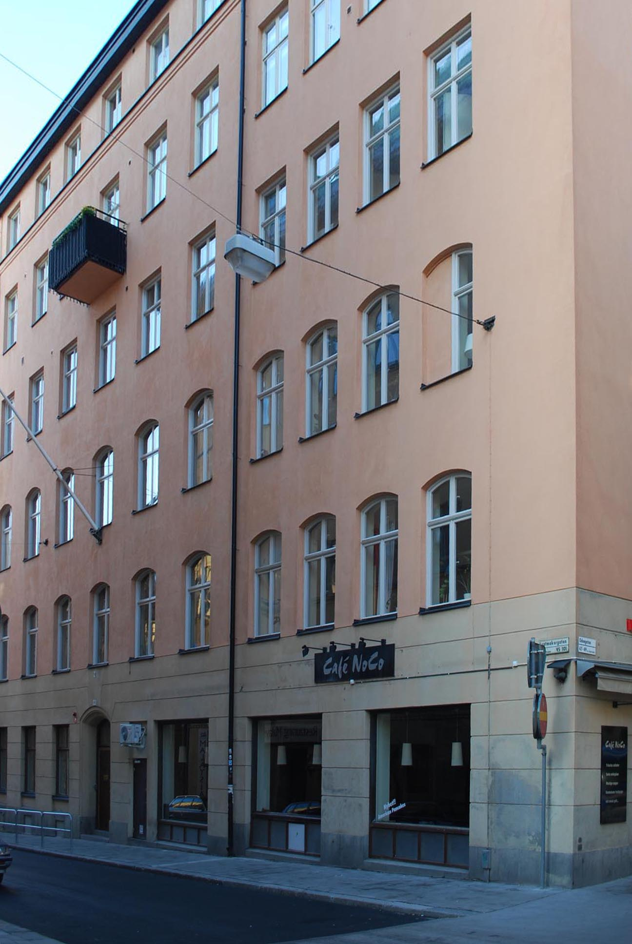 Luntmakargatan 101. Stockholms samgymnasium (1910-1970). Numera Europa Skolan, Byggnadsår 1889. Arkitekt G Sällström. Senare påbyggt